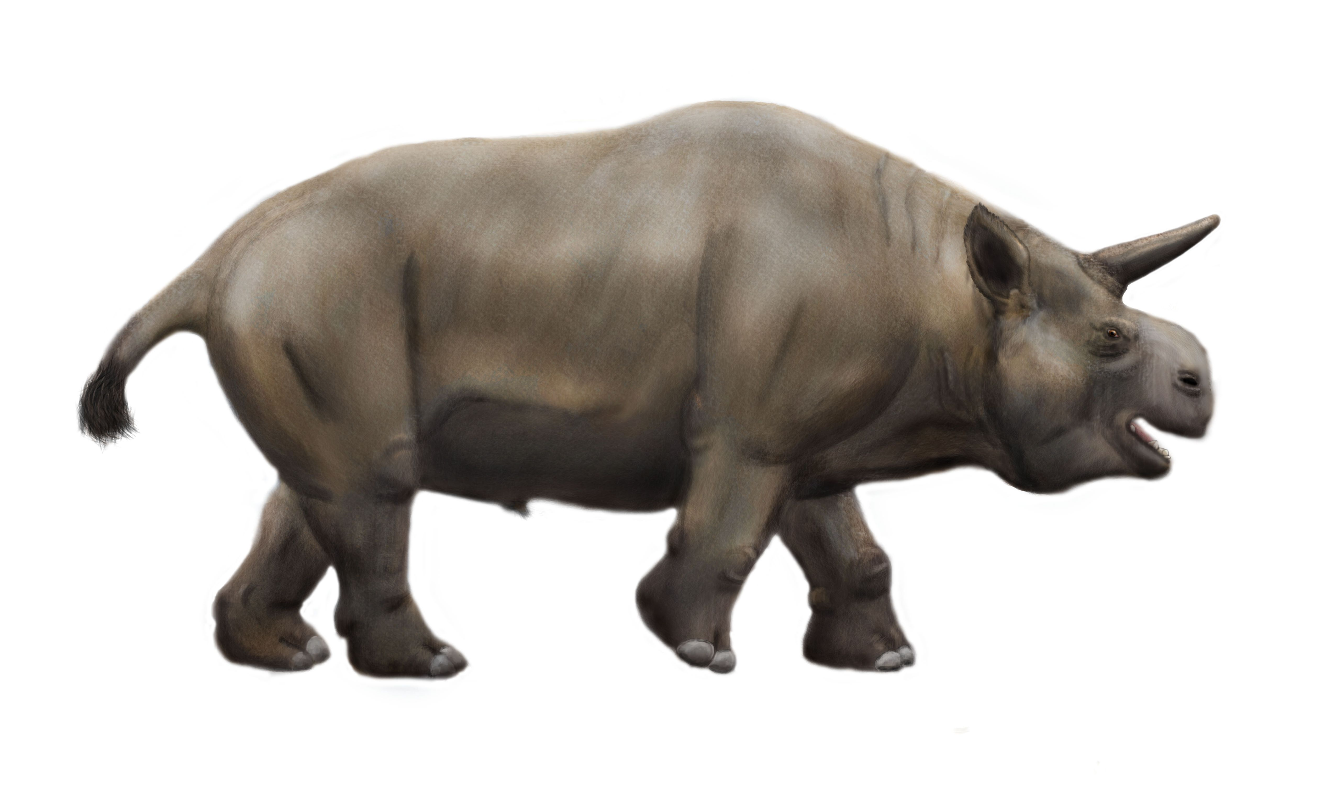 Recreación en vida del toxodóntido Hoffstteterius imperator. Basado en: Saint-Andre, P. A. (1993). Hoffstetterius imperator ng, n. sp. du Miocène supérieur de l'Altiplano bolivien et le statut des Dinotoxodontinés (Mammalia, Notoungulata). Comptes rendus de l'Académie des sciences. Série 2, Mécanique, Physique, Chimie, Sciences de l'univers, Sciences de la Terre, 316(4), 539-545.